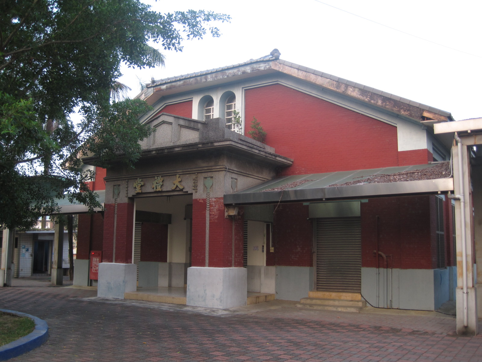 草屯新庄國小禮堂。